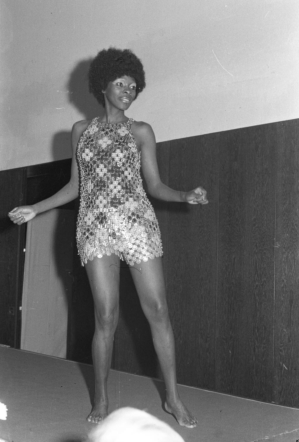 Starmannequin Periana aus Guadeloupe präsentiert ein Kettenhemd von Paco Rabanne.